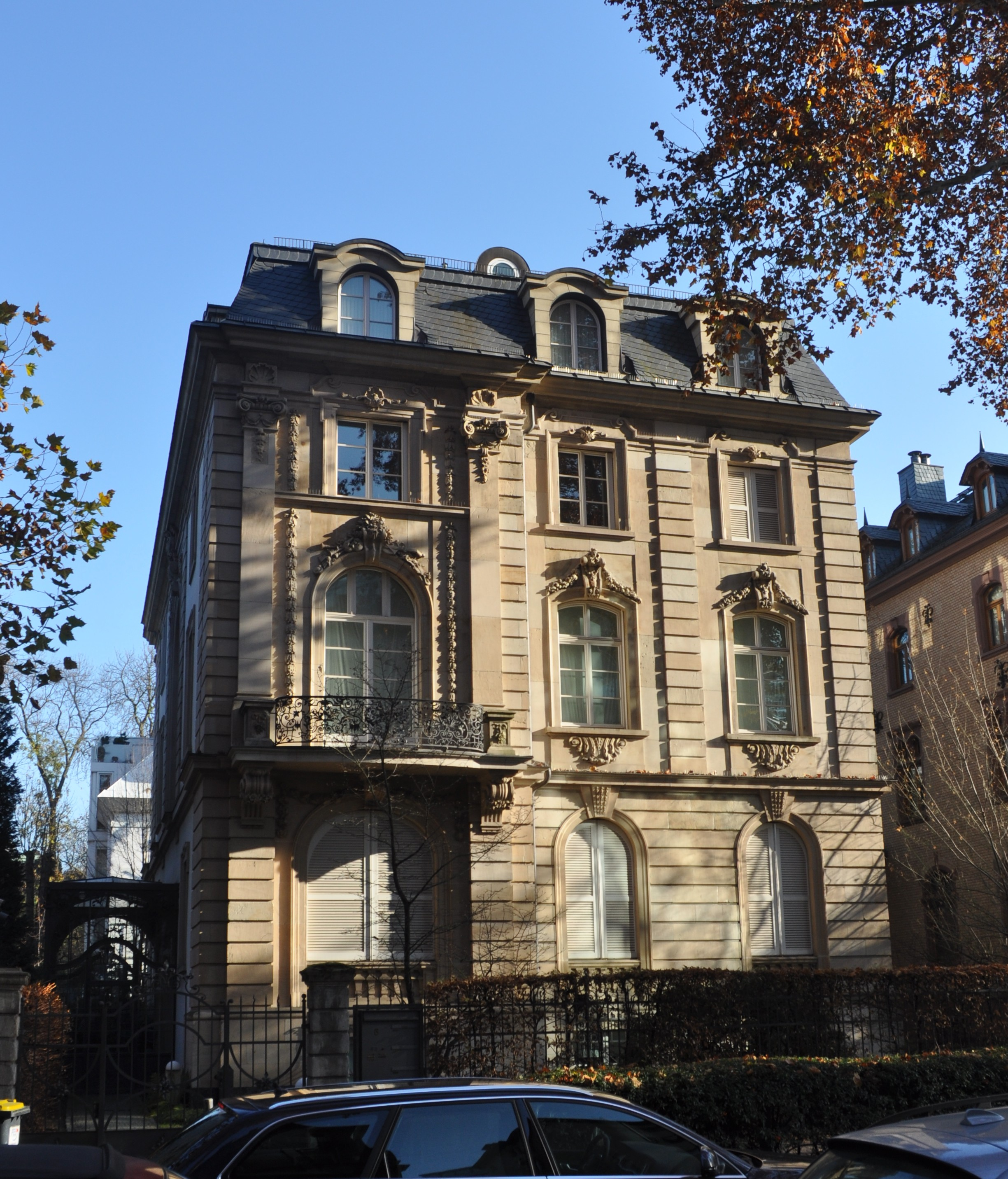 Denkmalgeschütztes Haus Siesmayerstraße 6 in Frankfurt